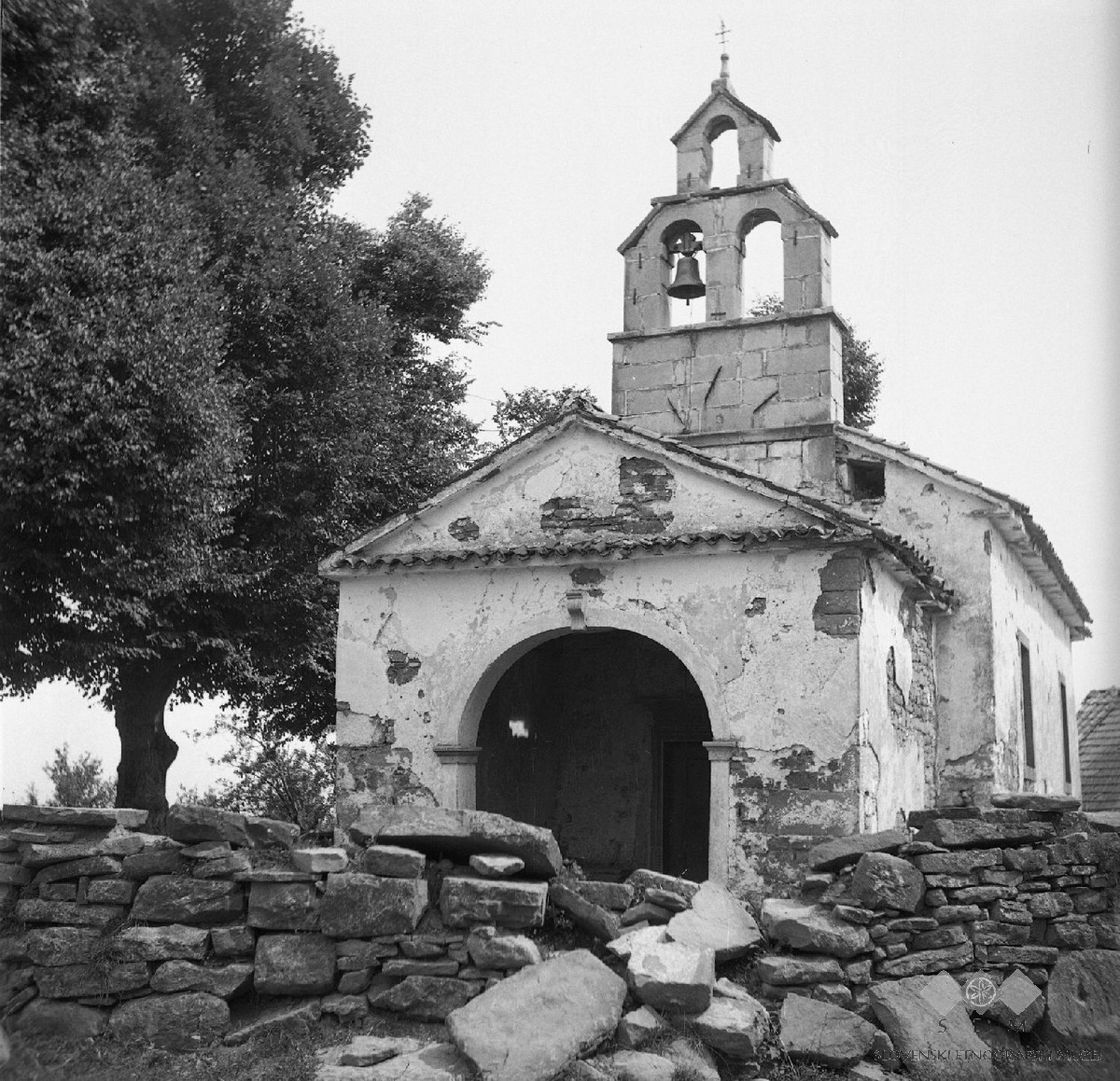 Cerkev v Podbežah.